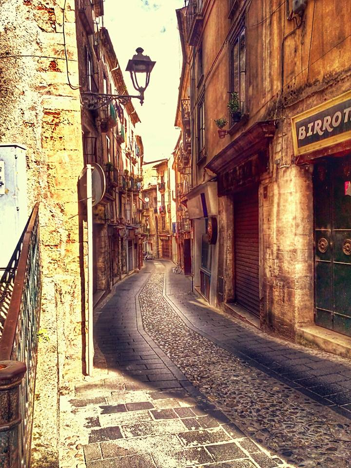 Scorcio di Corso Telesio nel centro storico di Cosenza